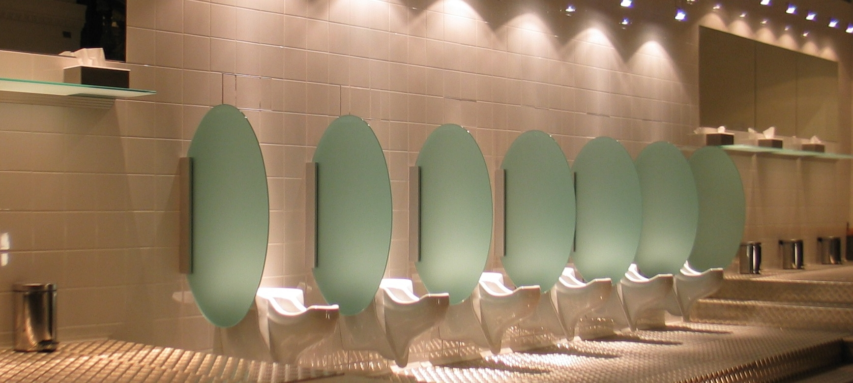 a female urinal. Moderne „Lady Loo“-Frauenurinale von GBH, in Reihenanordnung mit Trennwänden